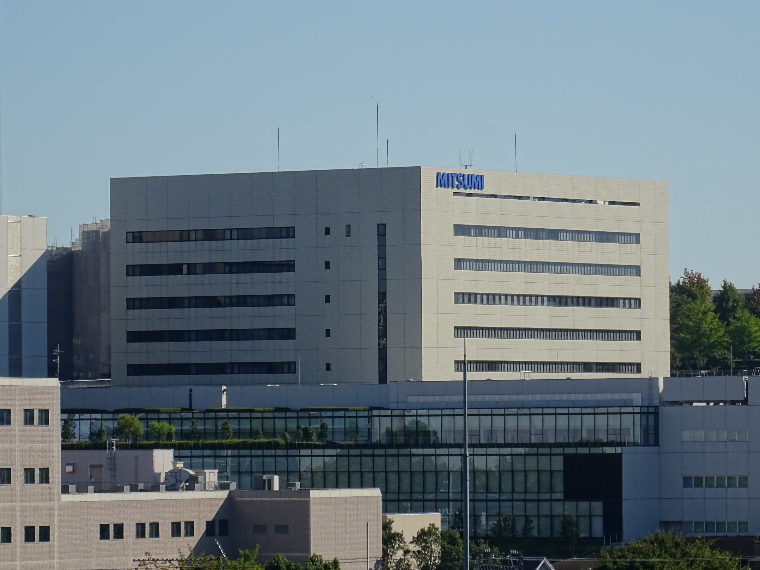 多摩市にあるミツミ電機本社ビル（2015/10/08撮影）